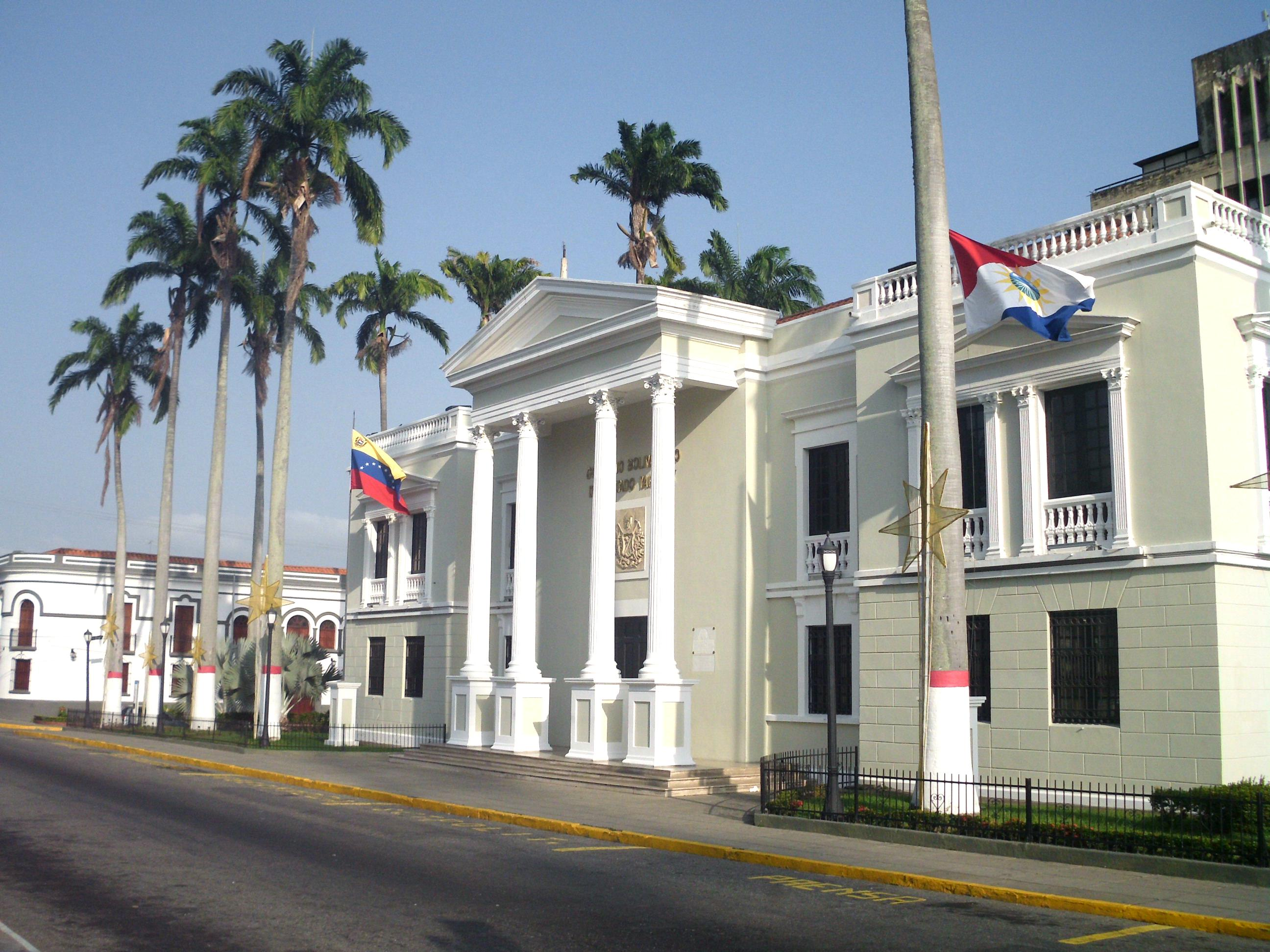 Gobernación del Estado Yaracuy